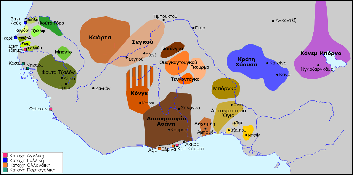 Χάρτης της Δυτικής Αφρικής στα τέλη του 18ου αιώνα